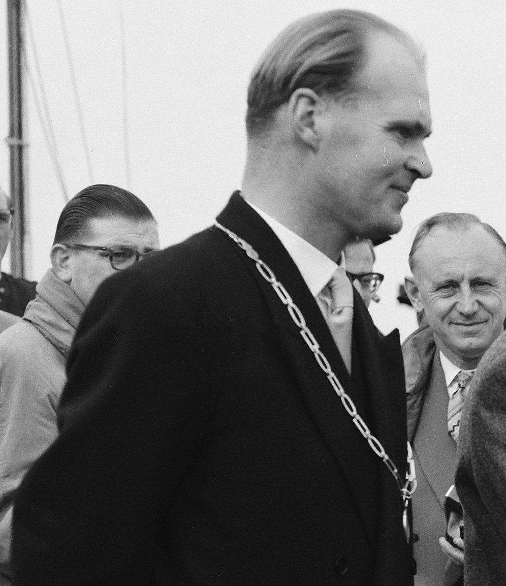 Collectie / Archief : Fotocollectie Anefo Reportage / Serie : [ onbekend ] Beschrijving : Sluiting dijk naar Marken. Links burgemeester H.G.M. te Boekhorst van Broek in Waterland, rechts burgemeester B.G. van Hout van Marken Datum : 17 oktober 1957 Locatie : Marken, Noord-Holland Trefwoorden : burgemeesters, dijken, waterstaat Persoonsnaam : Boekhorst, H.G.M. te, Hout, B.G. van Fotograaf : Pot, Harry / Anefo Auteursrechthebbende : Nationaal Archief Materiaalsoort : Negatief (zwart/wit) Nummer archiefinventaris : bekijk toegang 2.24.01.04 Bestanddeelnummer : 909-0390 Reacties Geplaatst door Caroliene op 24 maart 2015 - 15:08. Minister J. Algera feliciteert de burgemeester in het bijzijn van de commissaris van de koningin in Noord-Holland dr. M.J. Prinsen en de directeur-generaal van Rijkswaterstaat (uiterst rechts) ir. A.G. Maris